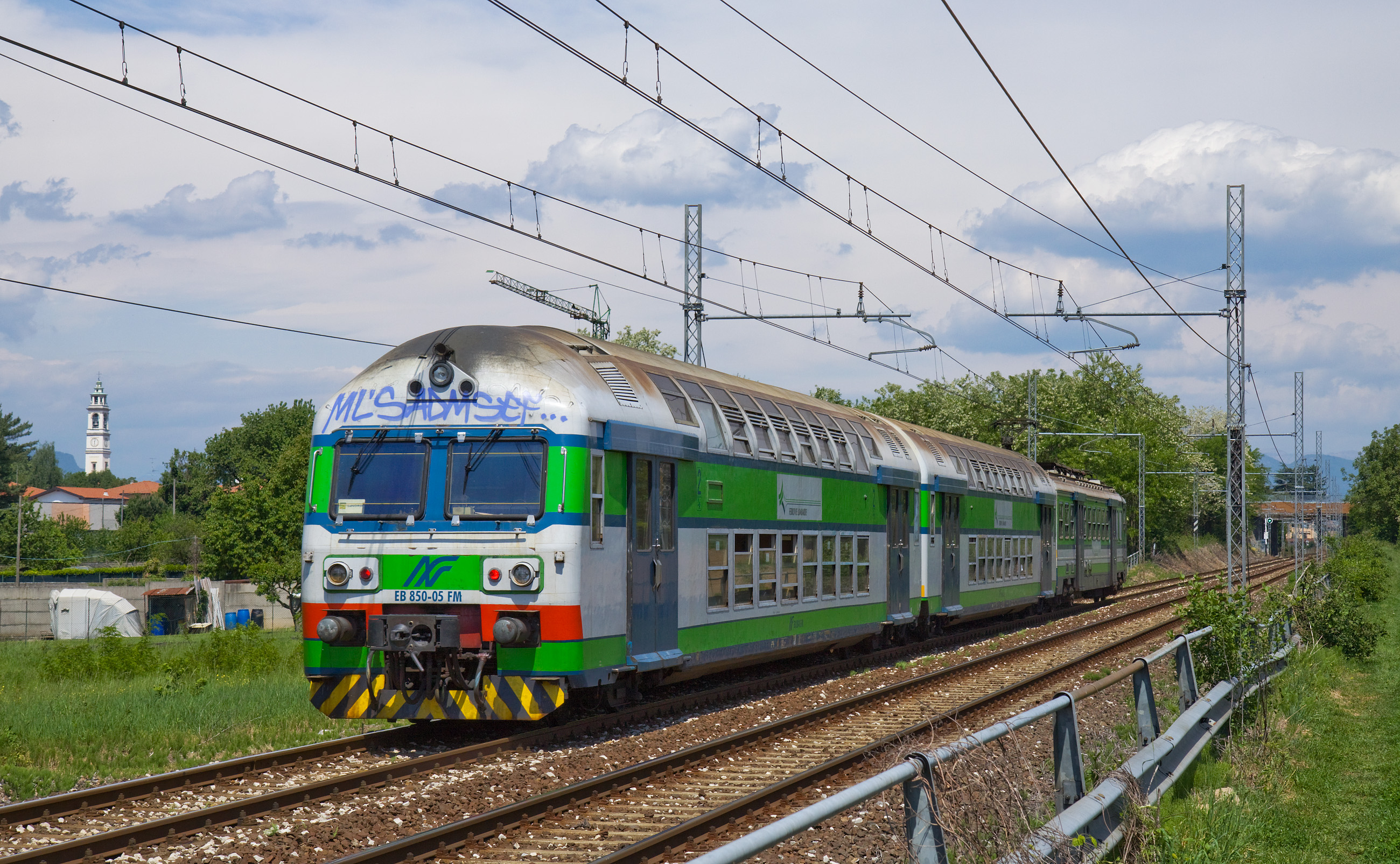 Treno di carrozze Casaralta delle Ferrovie Nord Milano, in corsa fra Vedano e Venegono